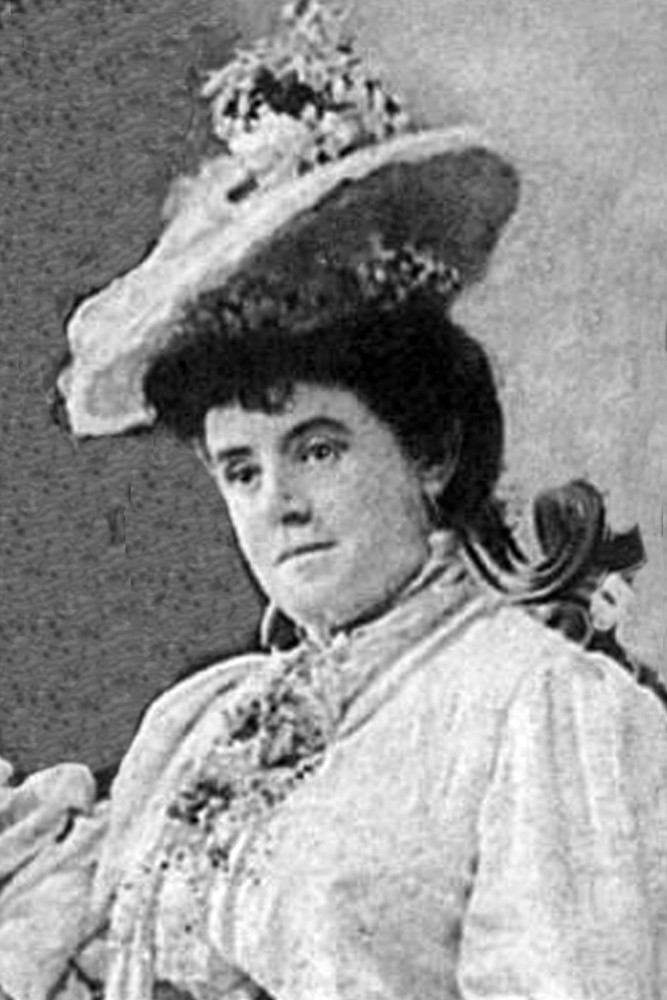 Fotografía de mi álbum personal. Es parte de una foto de familia, de 1904.